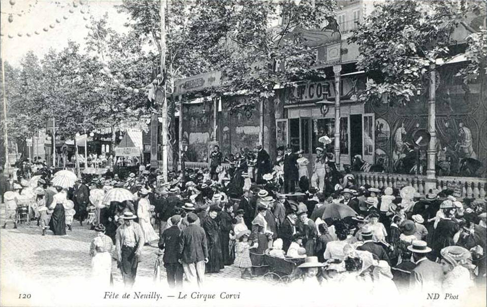 Fête de Neuilly, Le Cirque Corvi, c.1900 postcard